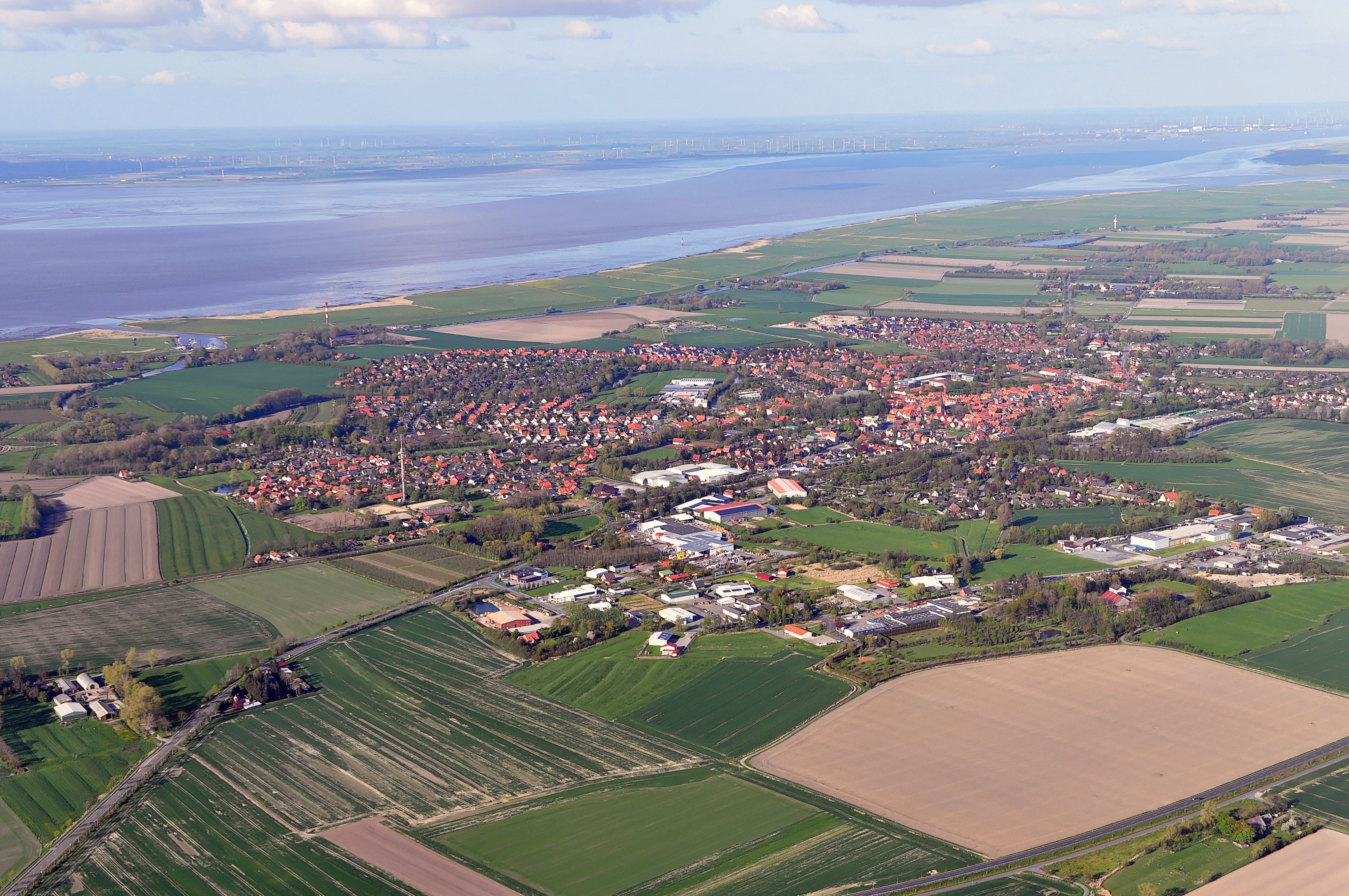 Luftbilder von der Nordseeküste 2012-05